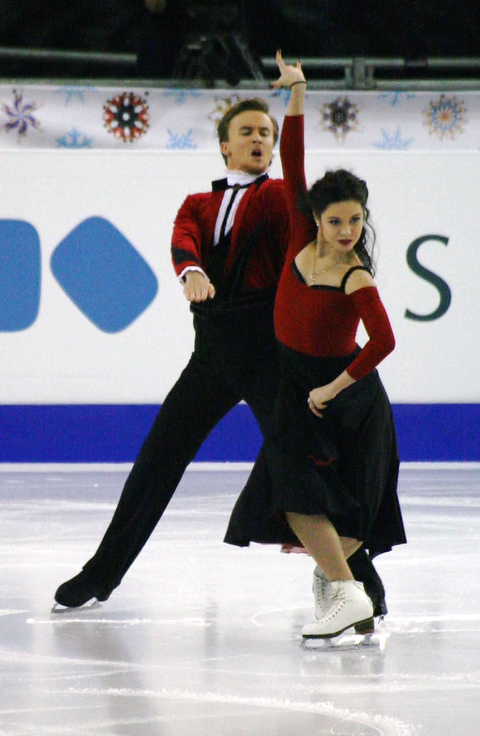 Елена Ильиных и Руслан Жиганшин (Россия) на финале Гран-при по фигурному катанию 2014-2015. Короткий танец.